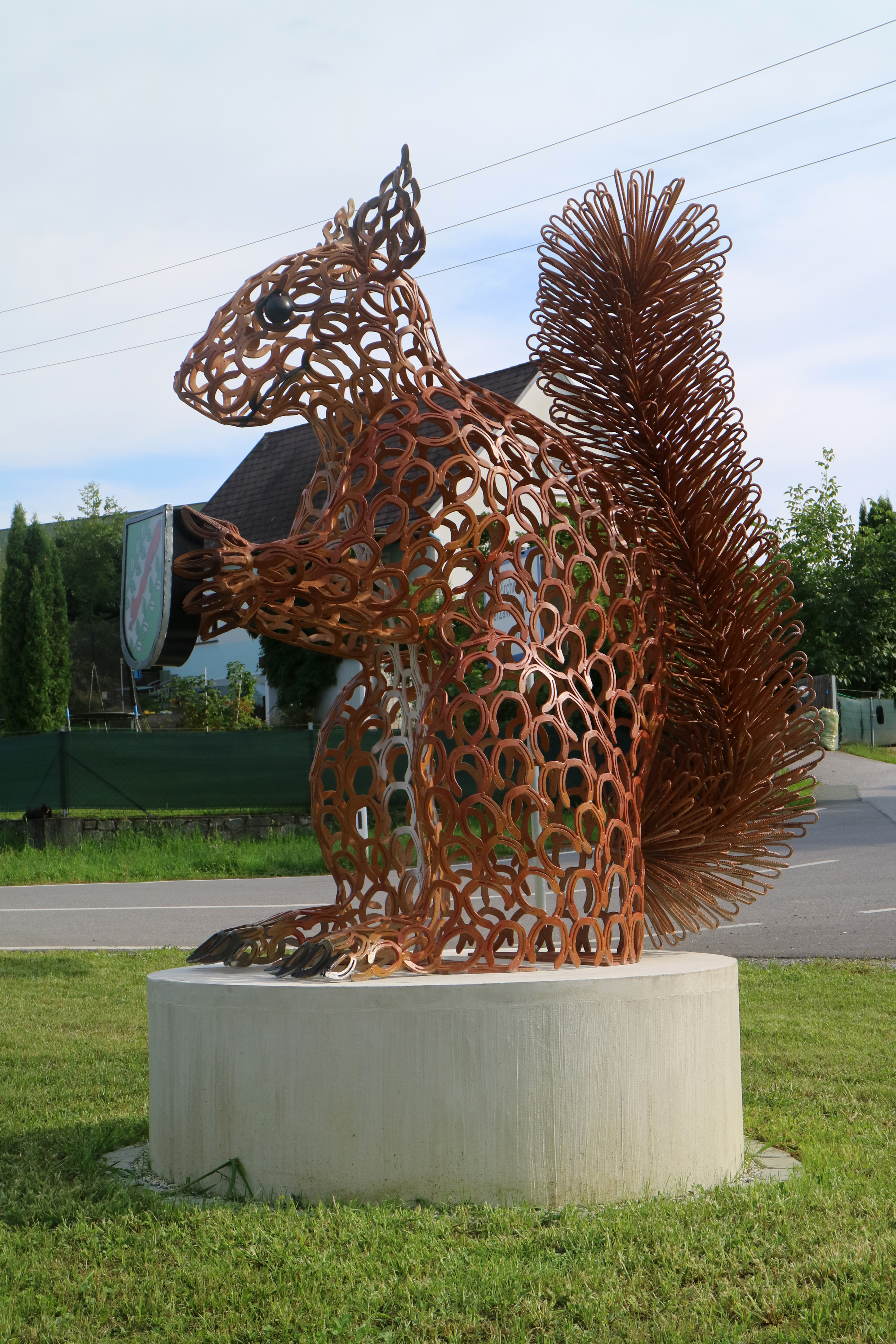 Wappentier von Hofstätten an der Raab (Steiermark) aus Hufeisen